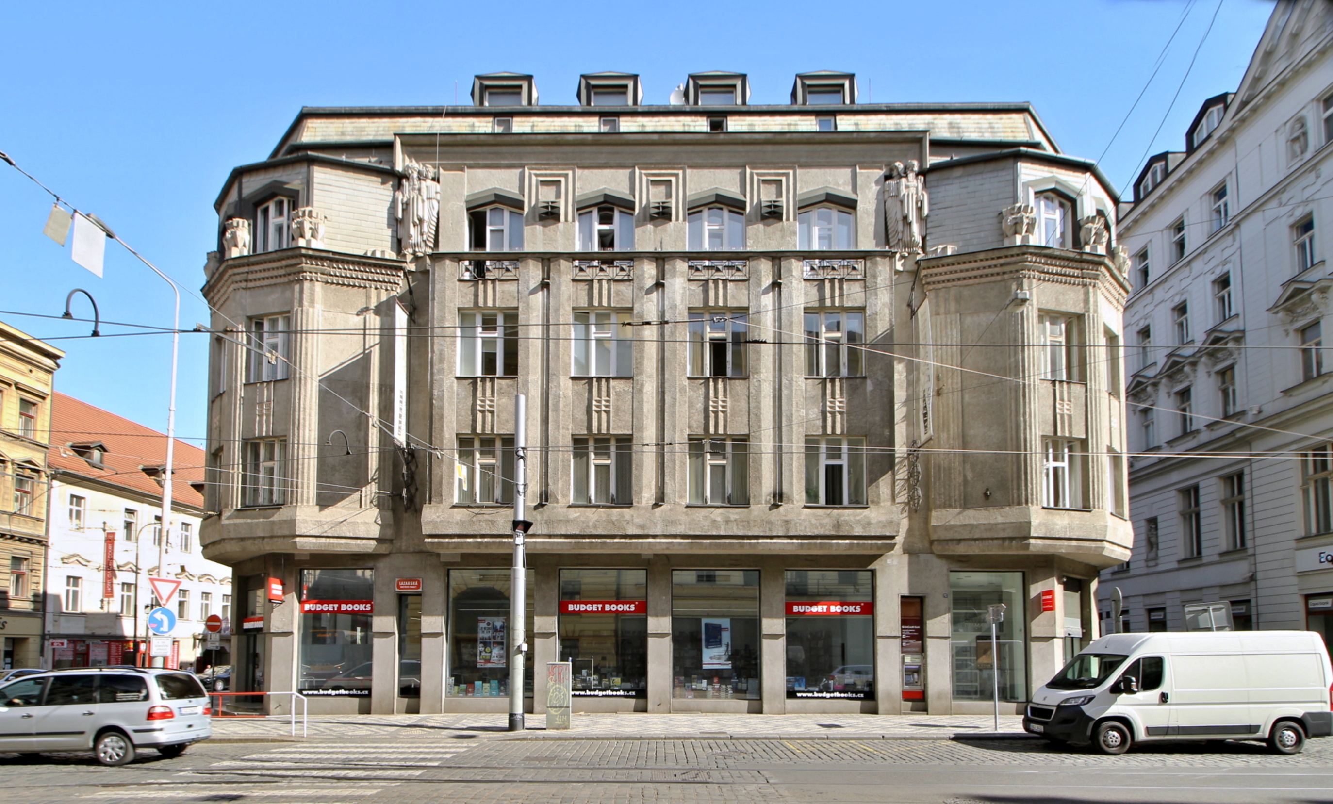 Praha, Lazarská ulice, kubistický Palác Diamant